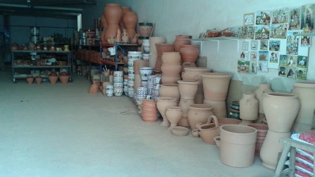 Exposició de perols del Vicent el de "Morimos"al carrer Perolers d'Alaquàs. Juliol de 2015